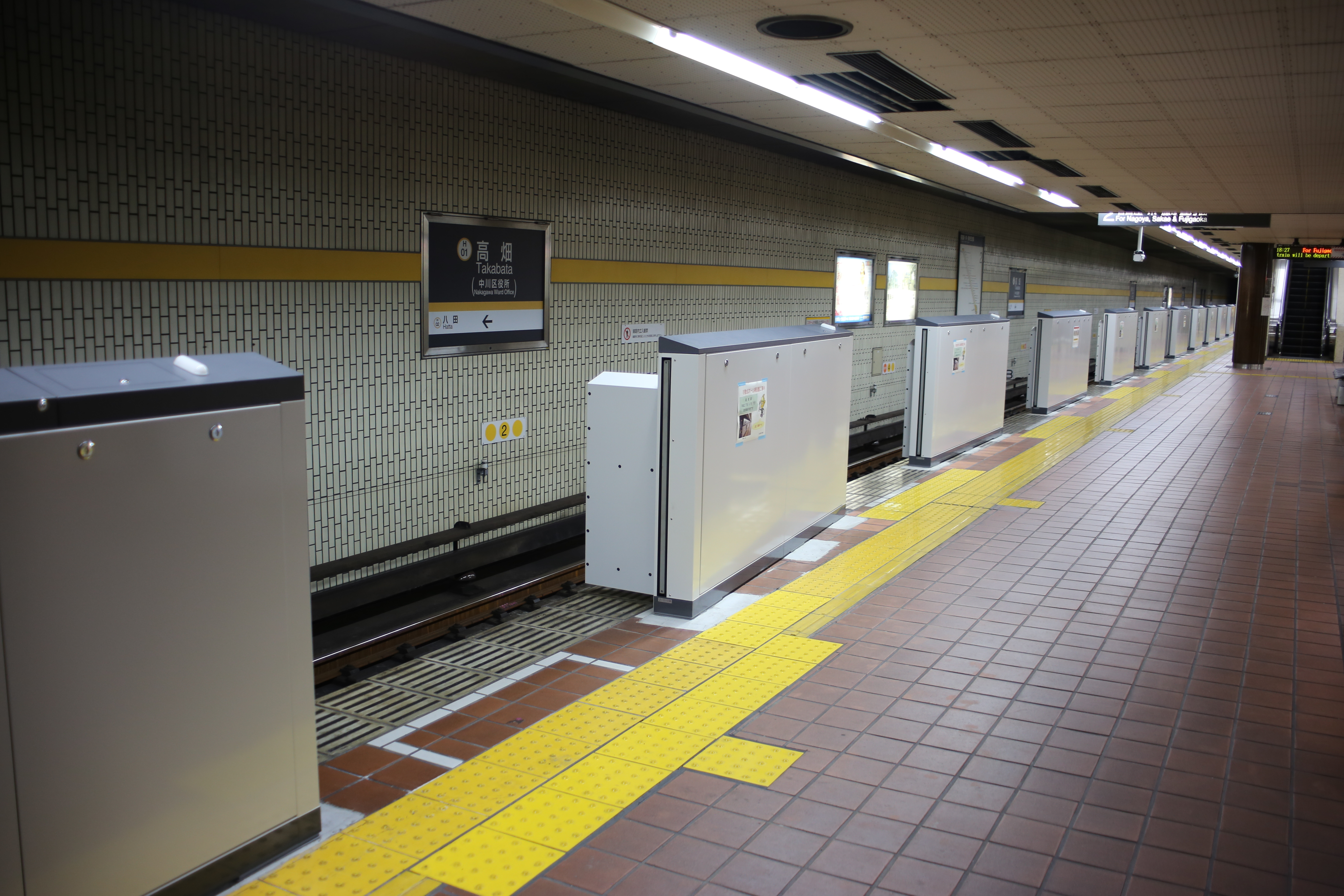 名古屋市営地下鉄東山線高畑駅プラットホーム。稼働前のホームドアの様子。